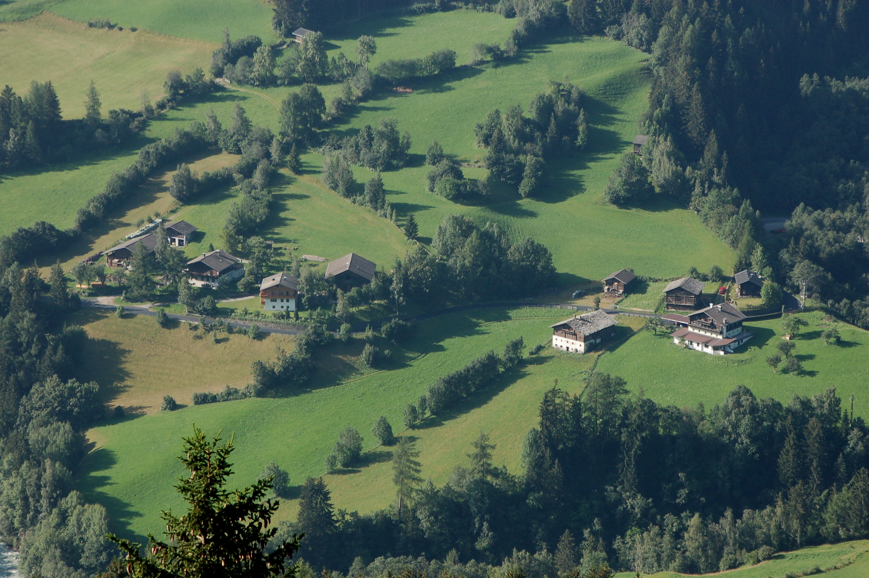 Der Weiler Rain der Fraktion Niedermauern (Gemeinde Virgen) gesehn von Norden (Hof Budam)